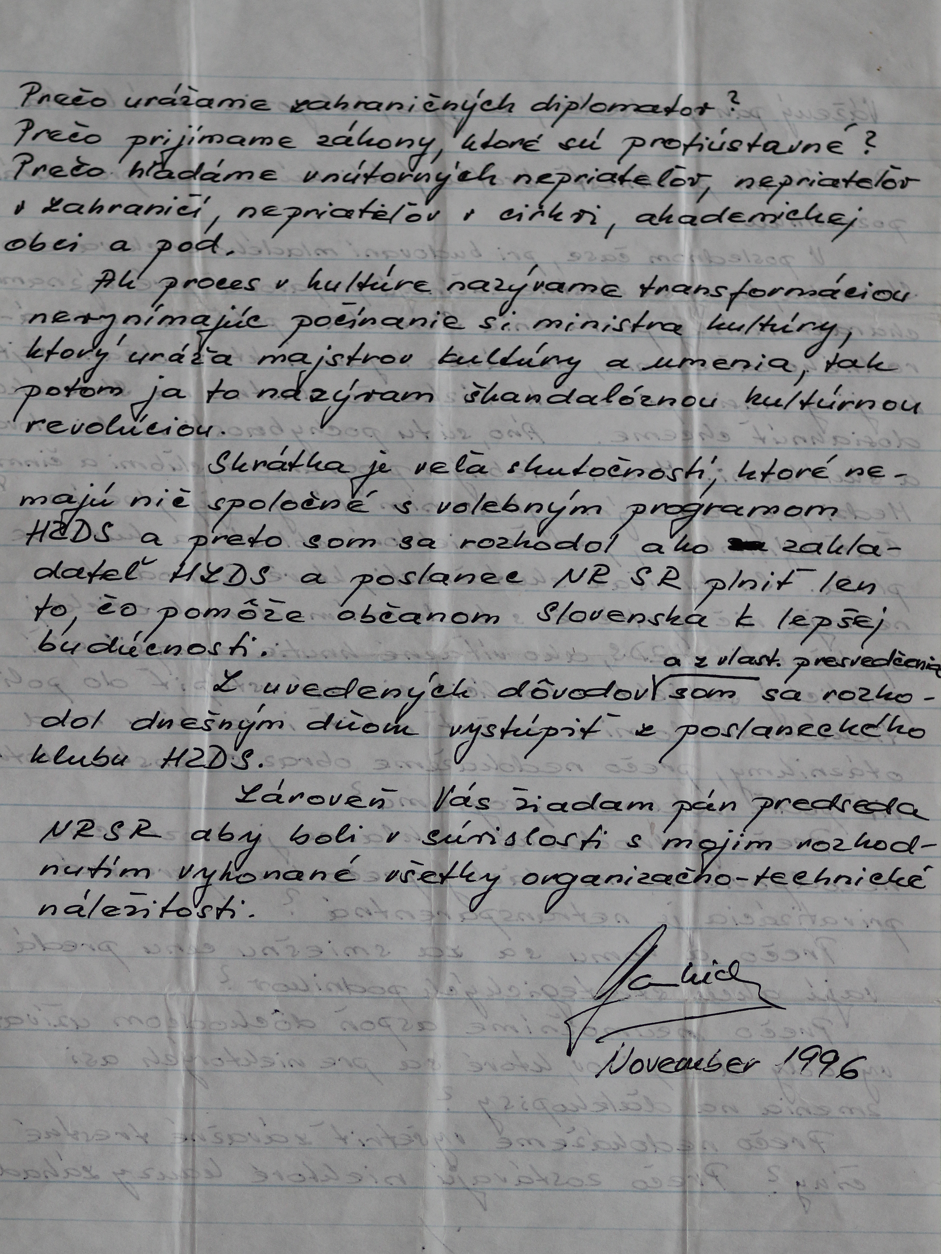 Gaulieder František